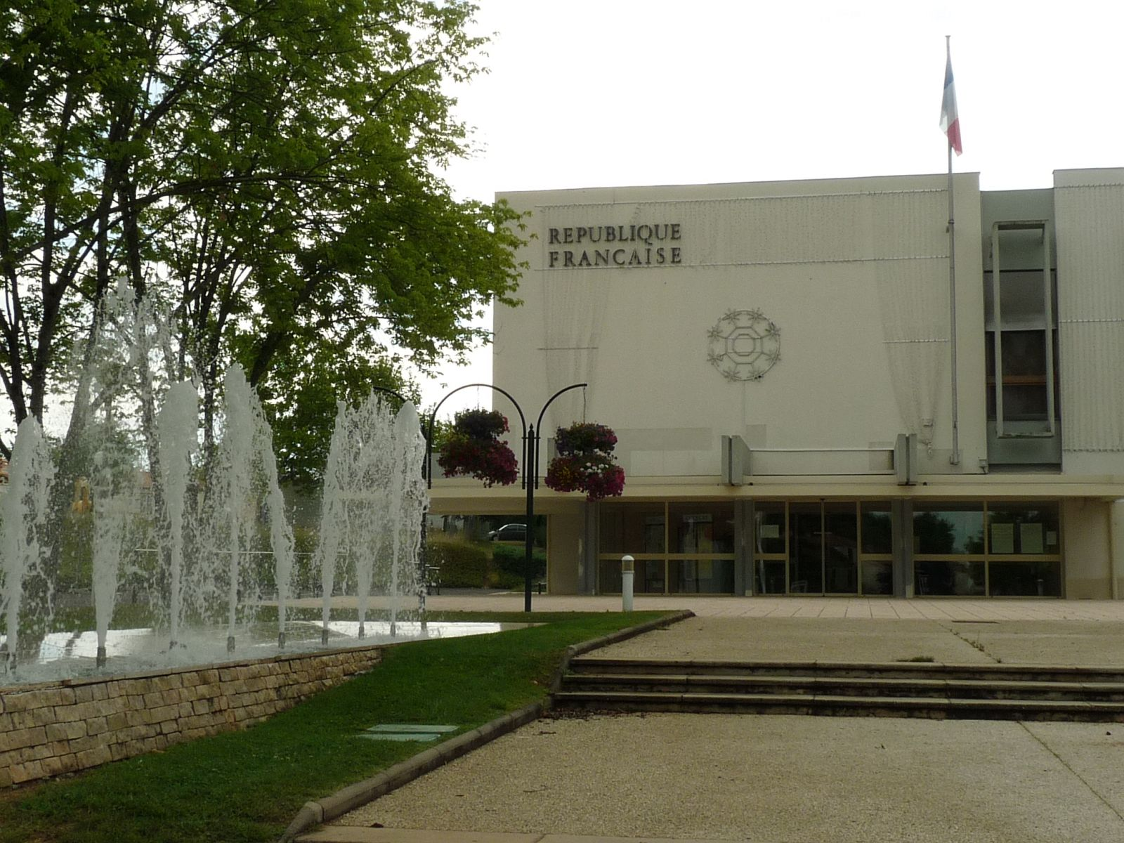 mairie de St-Yrieix-sur-Charente (16), France